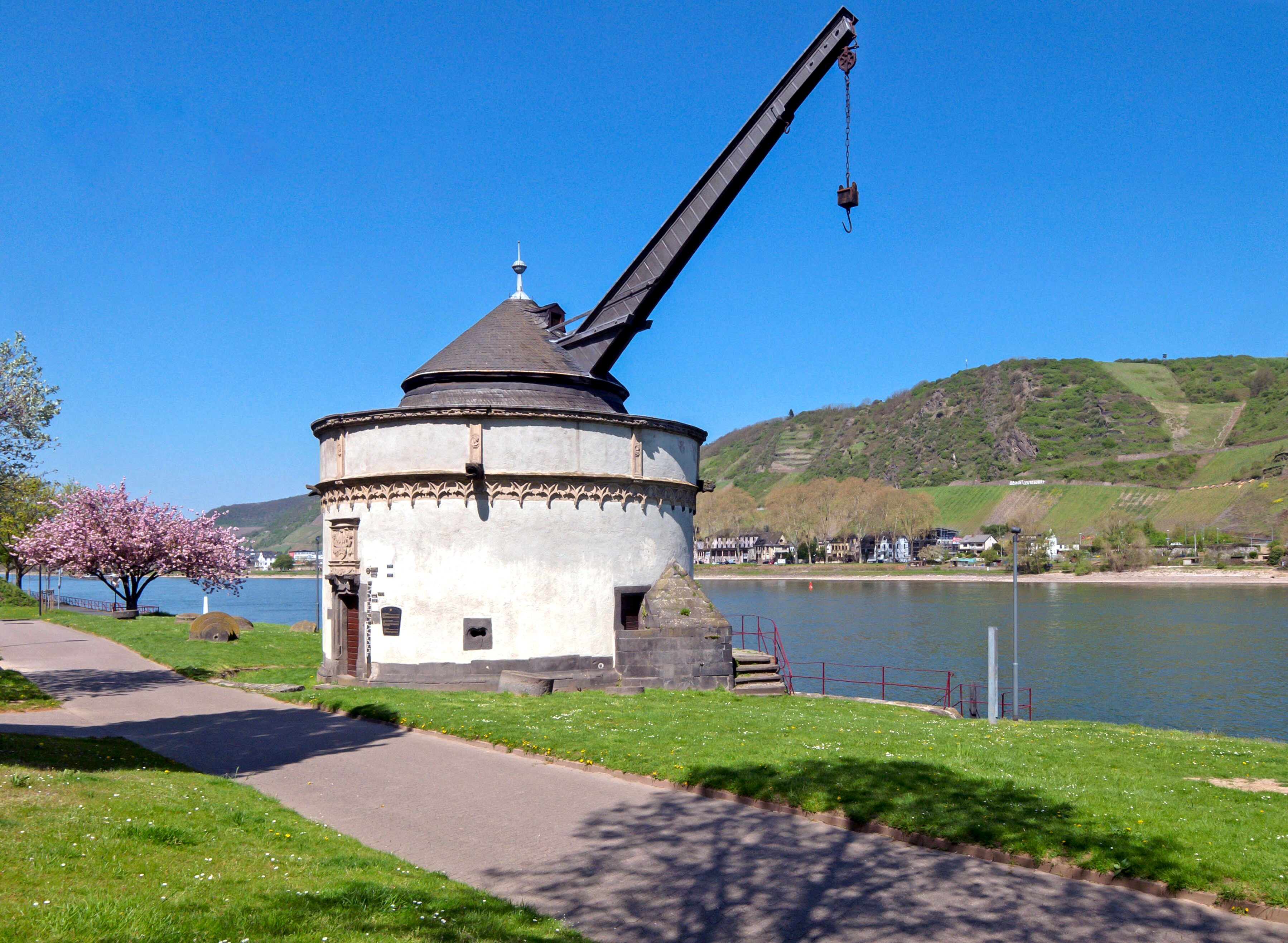 Alter Rheinkrahn am Andernacher Rheinufer. Industriedenkmal der rheinischen Renaissance.